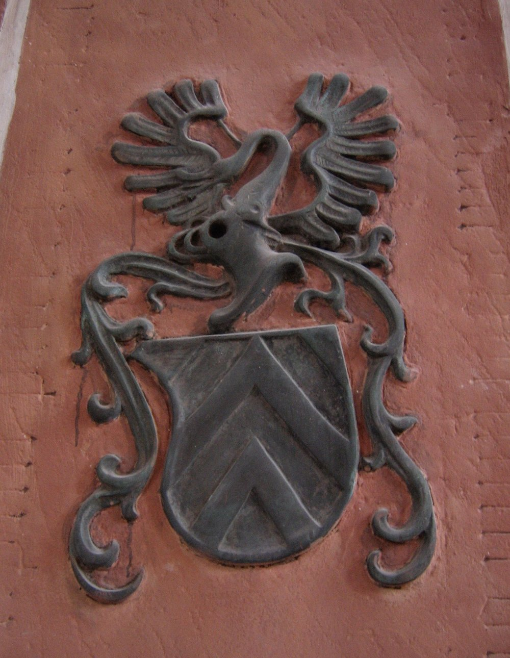 Detail aus der Grabplatte des Grafen Reinhard II. in der Marienkirche in Hanau: Wappen in Bronze